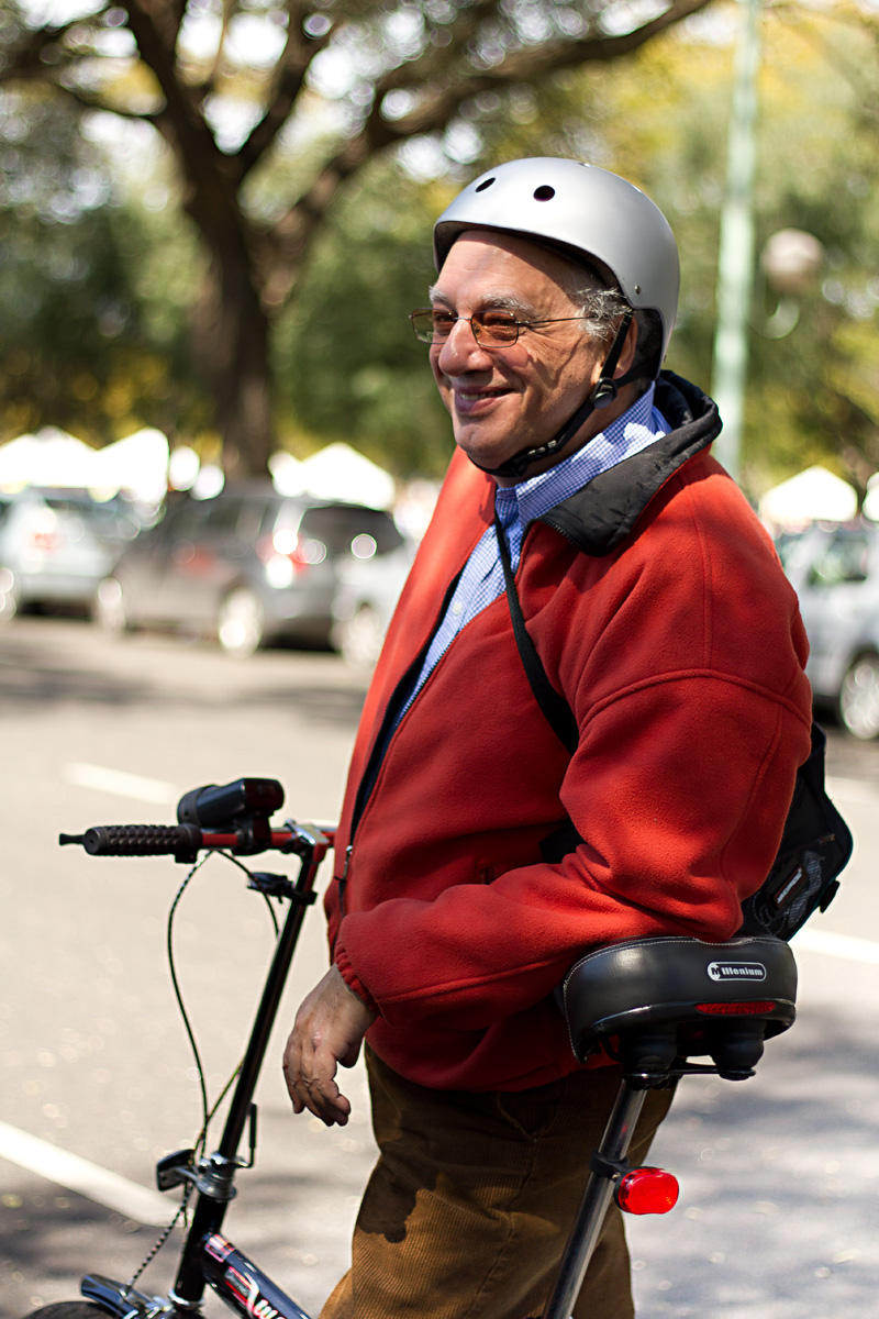 Foto: Estrella Herrera